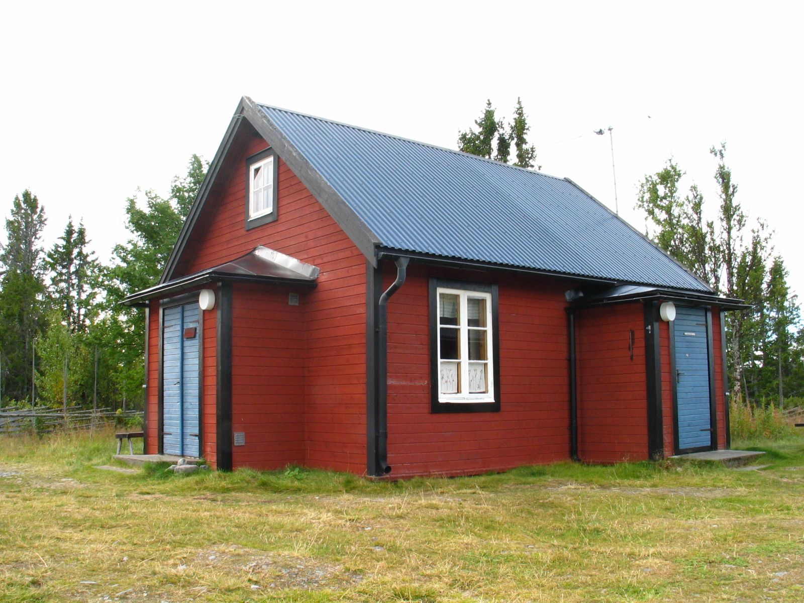 Turiststationen i Västra Arådalen